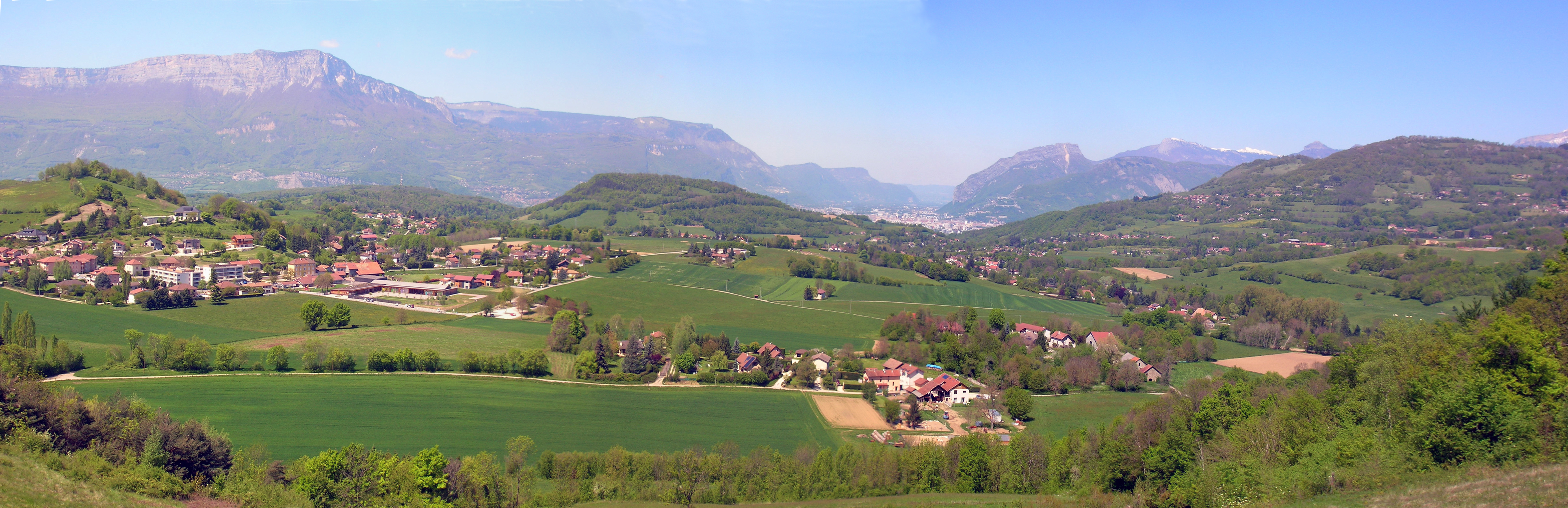 Panorama d'Herbeys et Brié-et-Angonnes. Sur le chemin des Crêtes d'Herbeys (qui touche les communes de Saint-Martin d'Uriage, Herbeys, Brié-et-Angonnes et Vaulnavey-le-Haut). Isère, Rhone-Alpes, France.